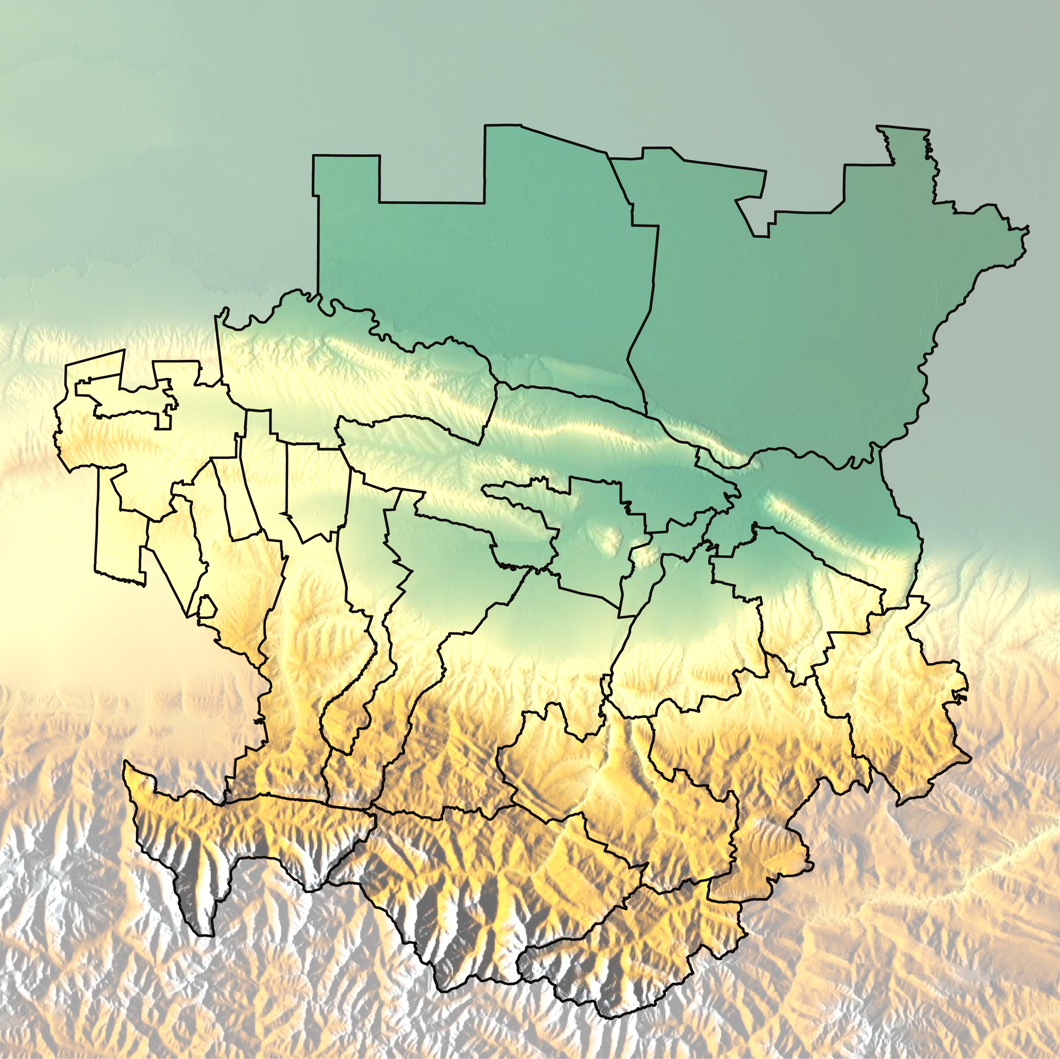 Карта Чечено-Ингушетия